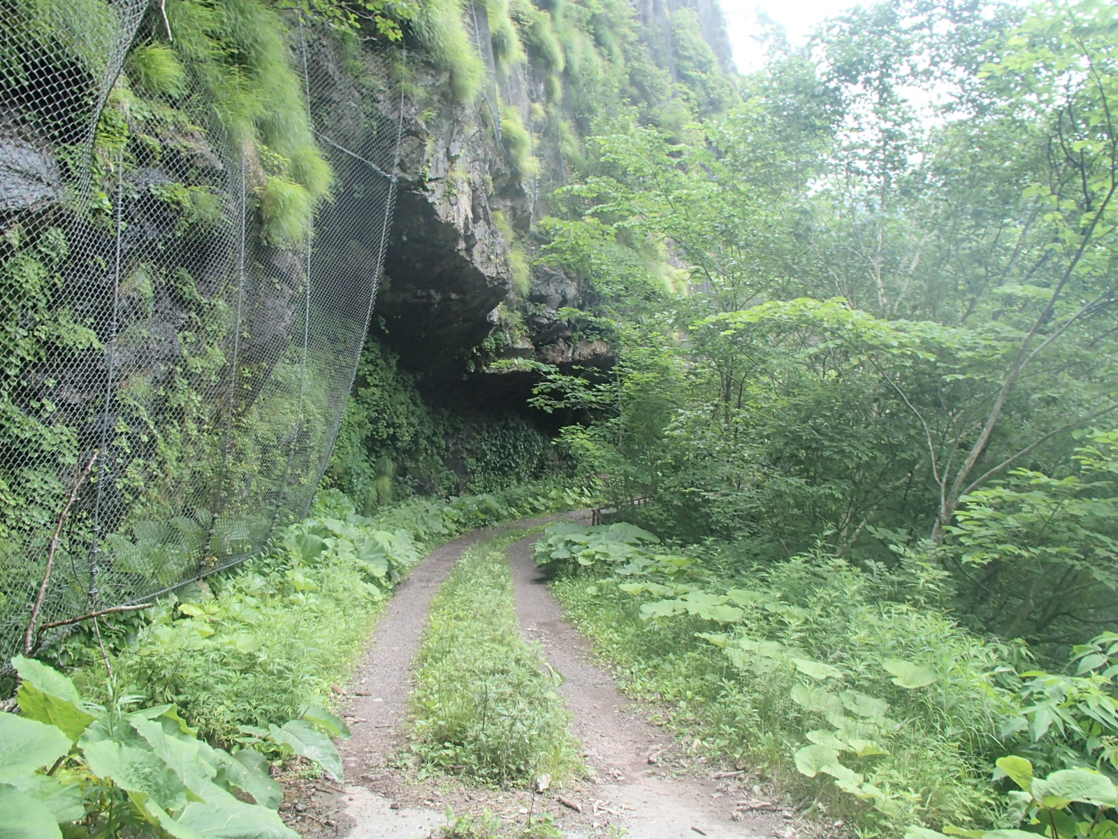 このような悪路が続く